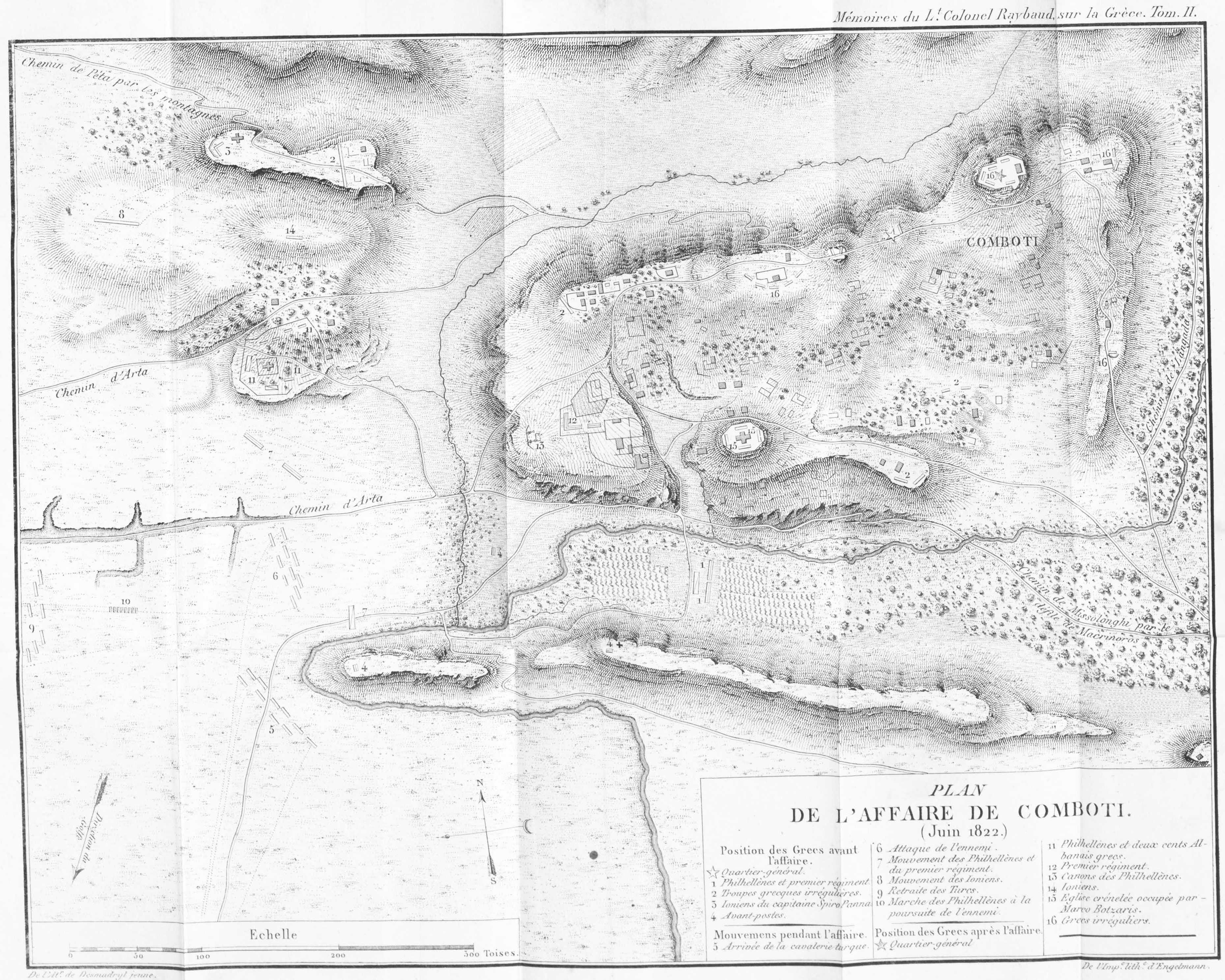 Plan de la première phase de la bataille de Péta : la bataille de Komboti 4 juillet 1822